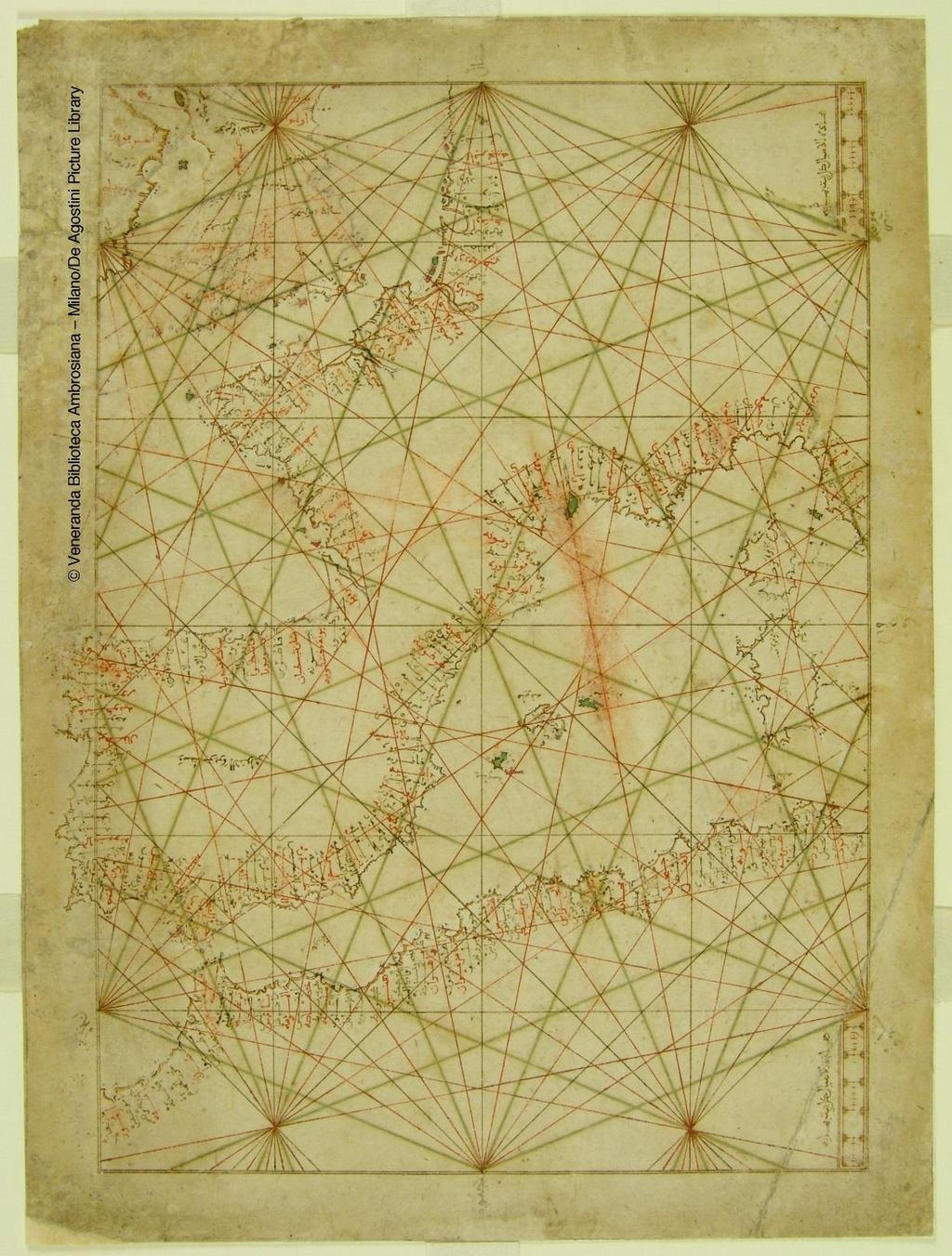 Portulan Arabe anonyme du début du XIV siècle sur papier, il s'agit de l'un des plus vieux Portulan découvert